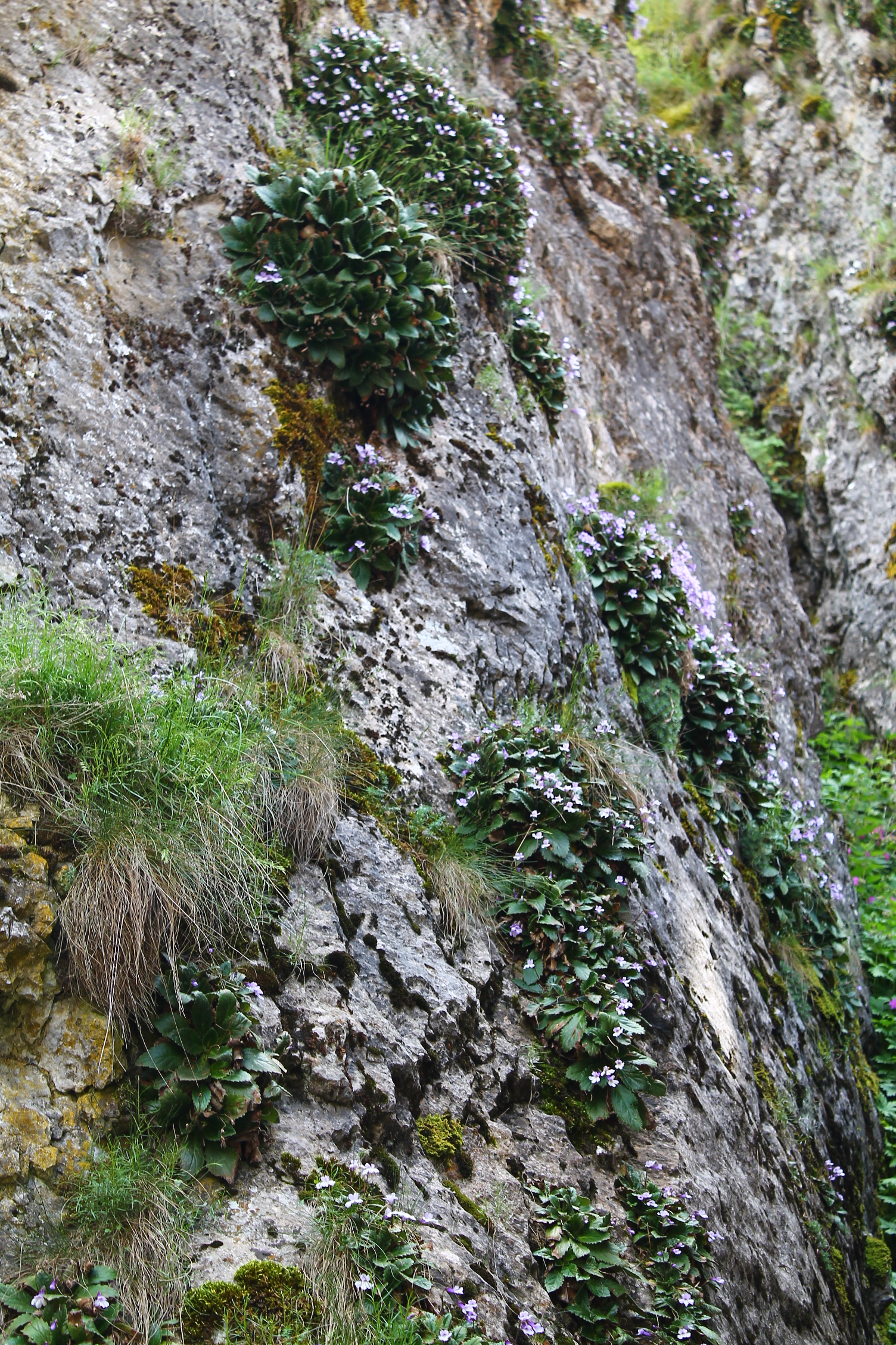 Орфеево цвете